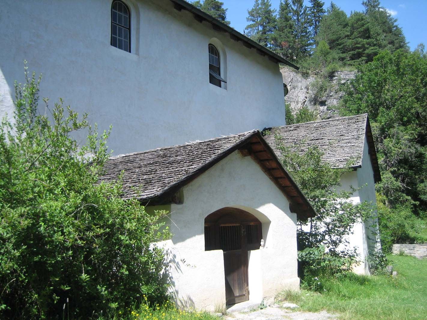 Beinhaus